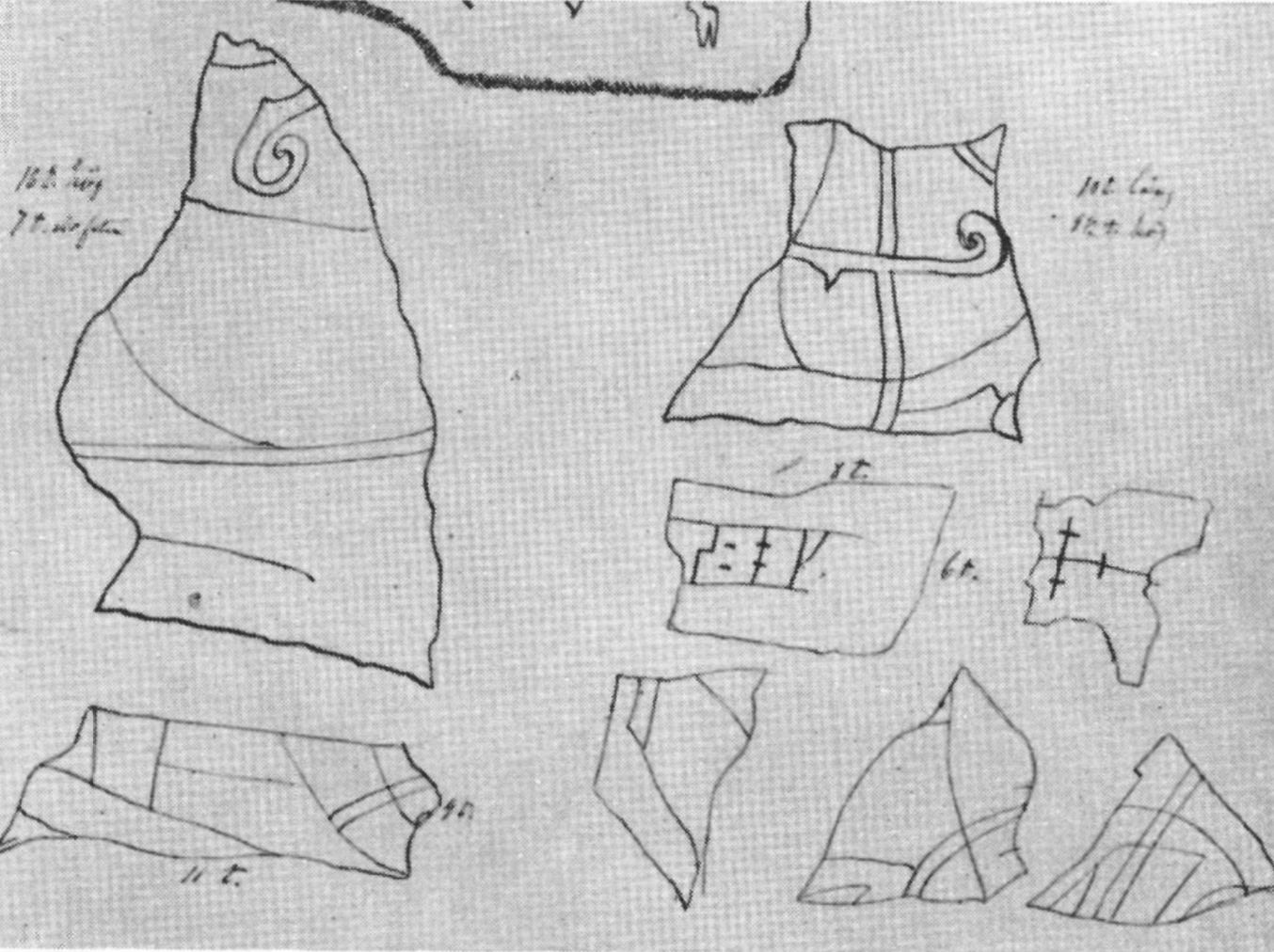 U 852. Balingsta kyrka. Efter bläckteckning av okänd i ATA.